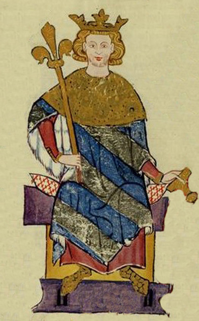 Václav II.